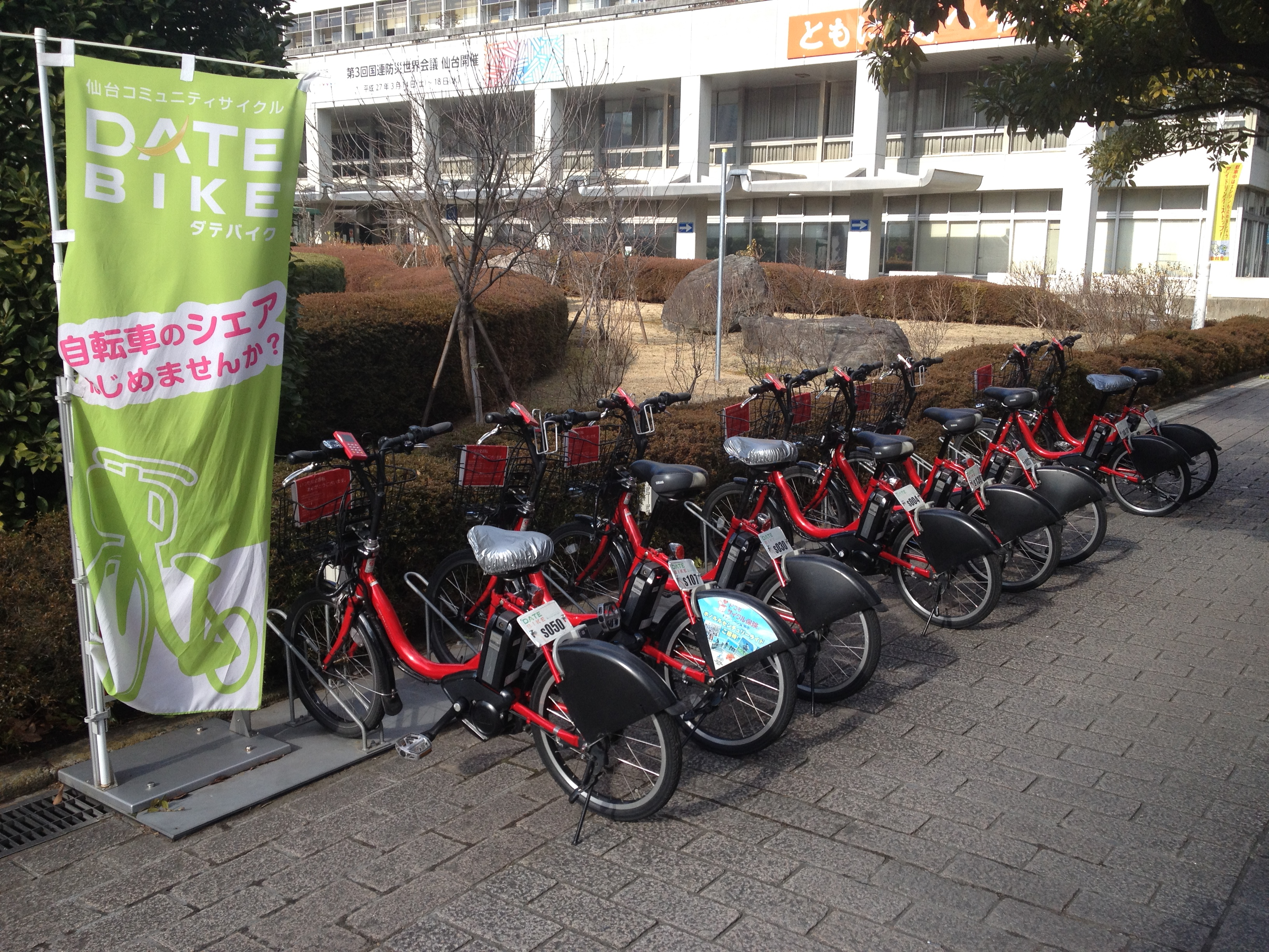 DATE BIKE（コミュニティサイクル） 市役所噴水前ポート